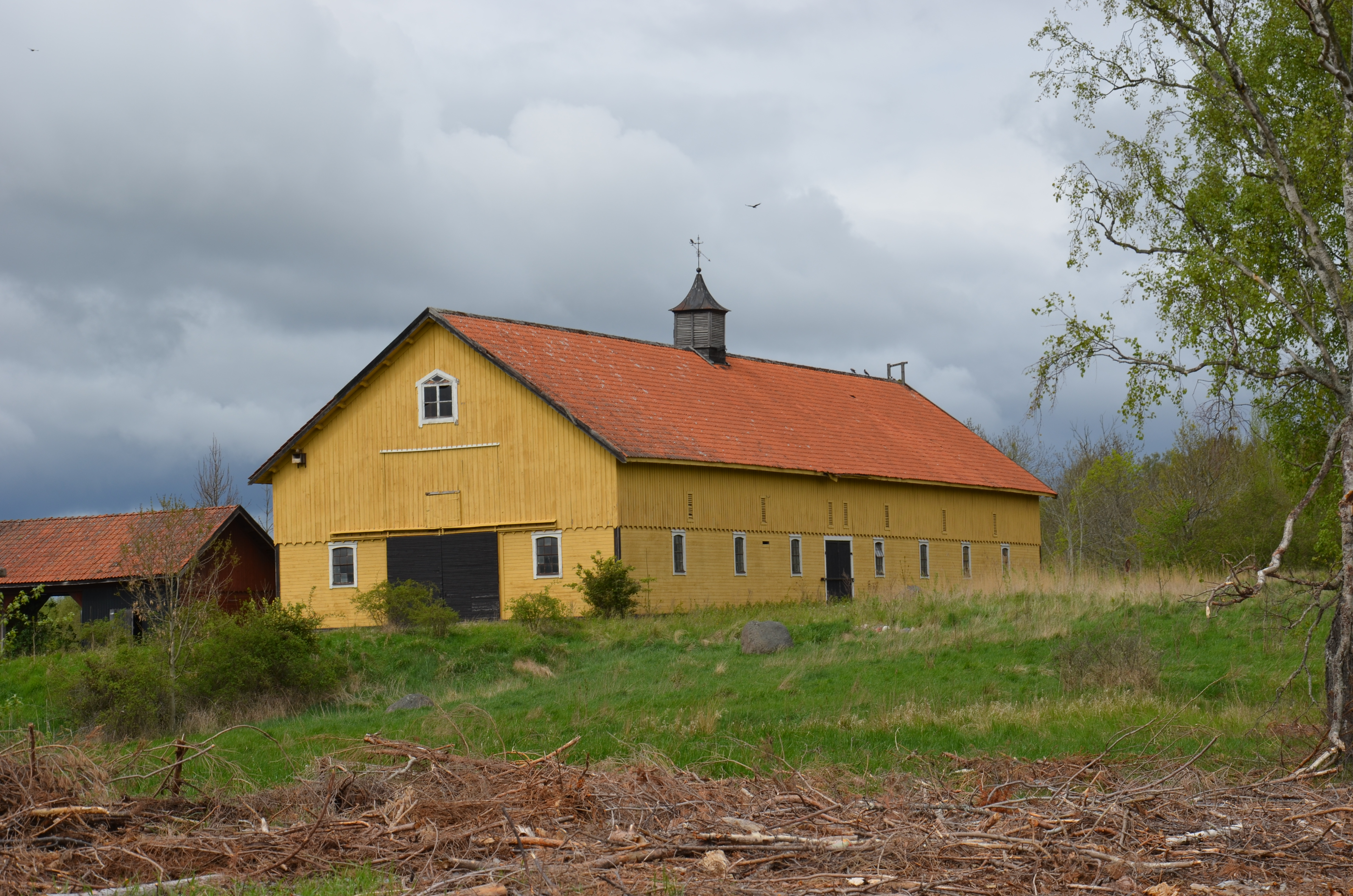 Händelö gård in Norrköping